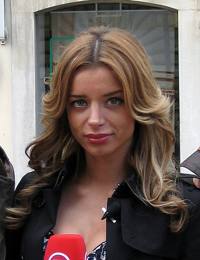 Fani Stipković u Rijeci